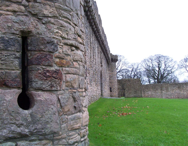 Craigmillar Castle, Edinburgh (Scotland) - inner curtain wall